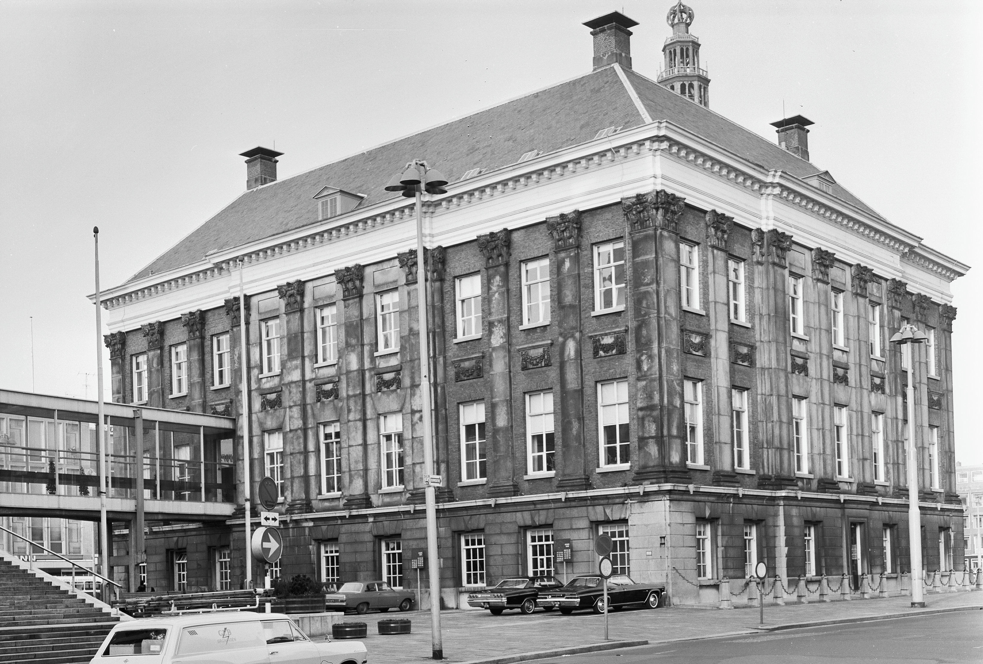 Stadhuis: zuid-west zijde exterieur